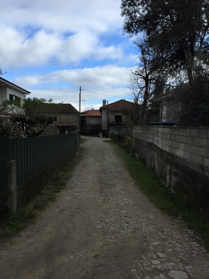 Cet endroit est une des partie les plus ancienne